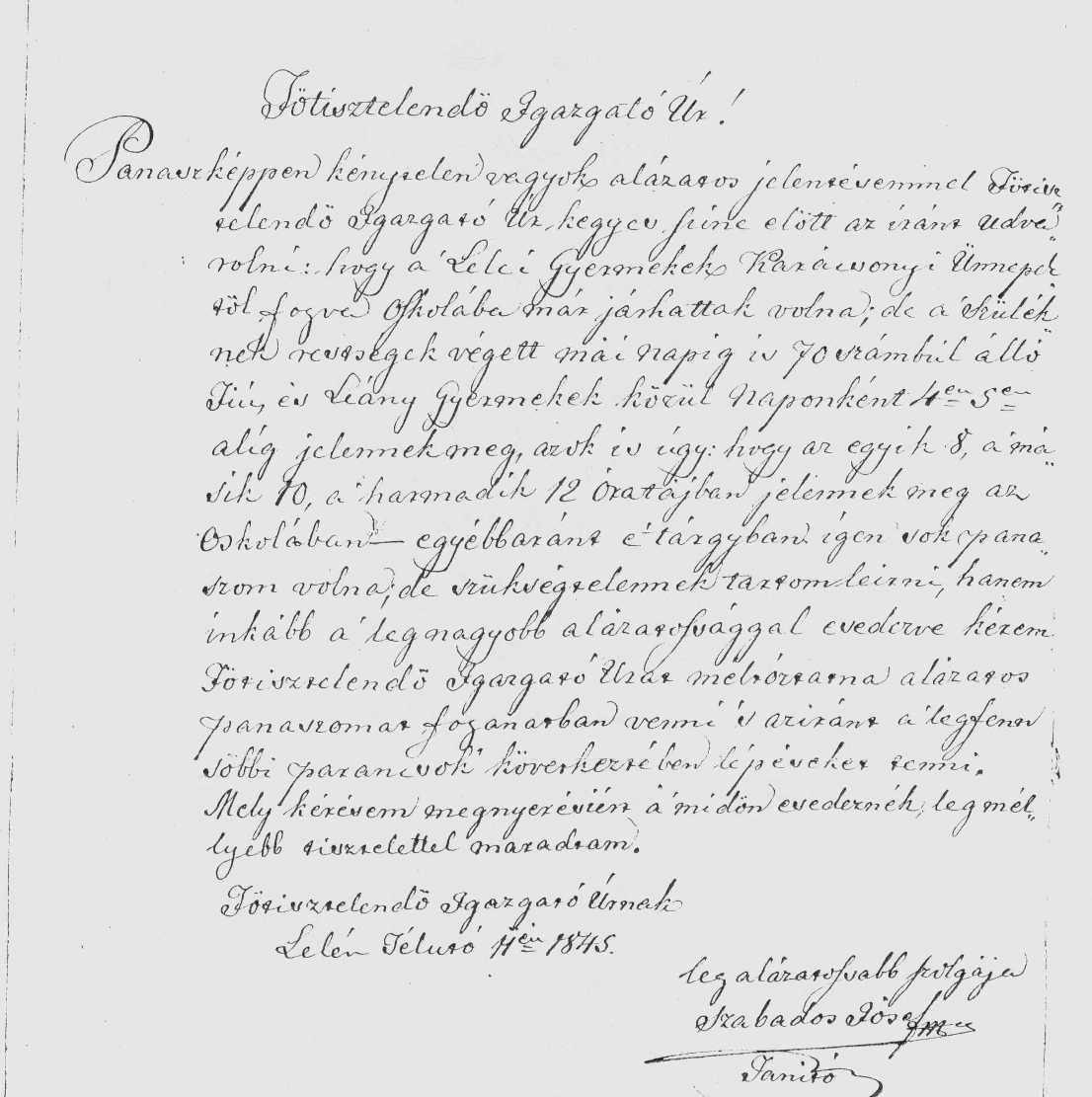 Szabados József maroslelei tanító panaszos levele a makói espereshez.